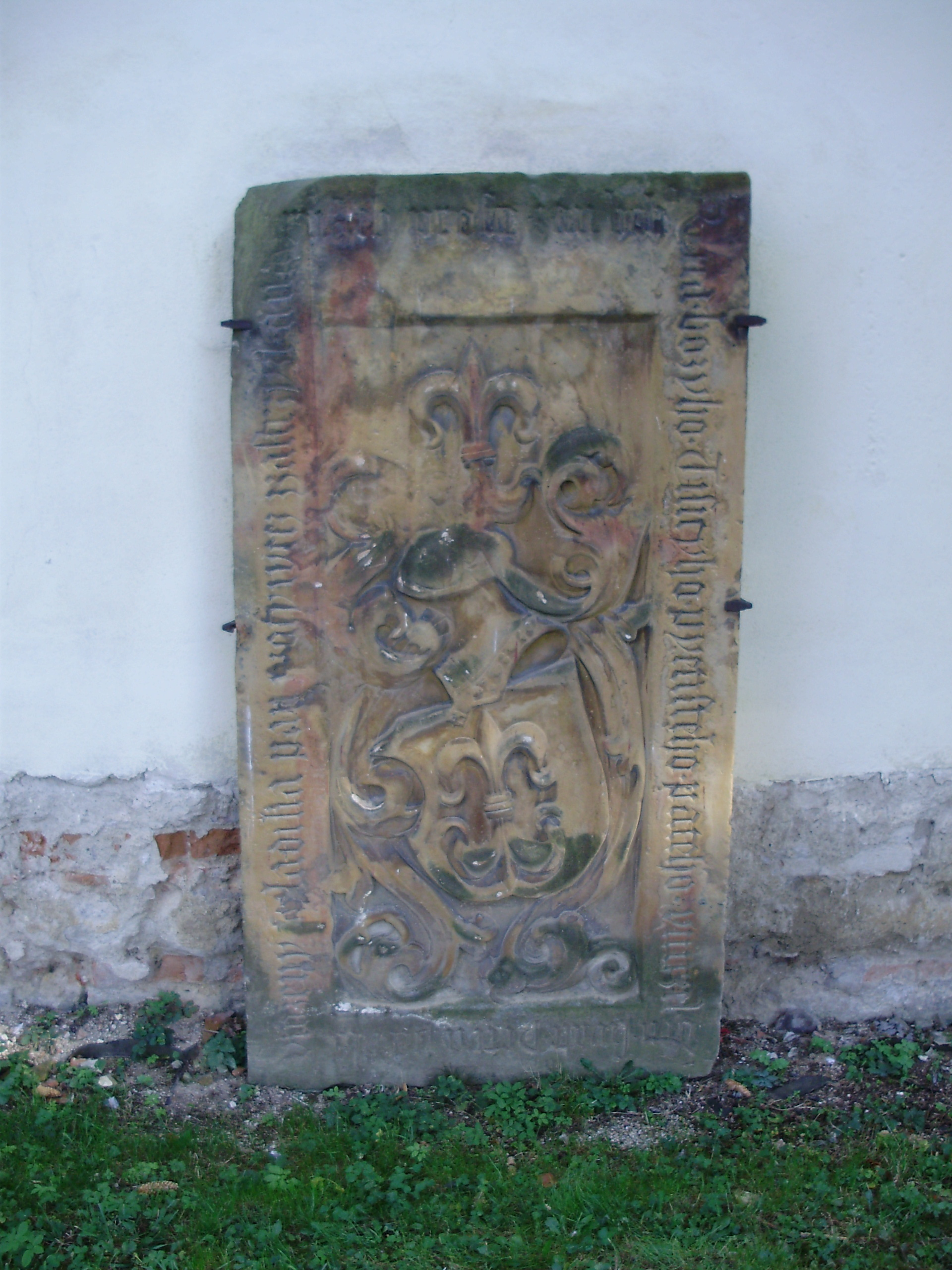 Náhrobek Protivce ze Zástřizl